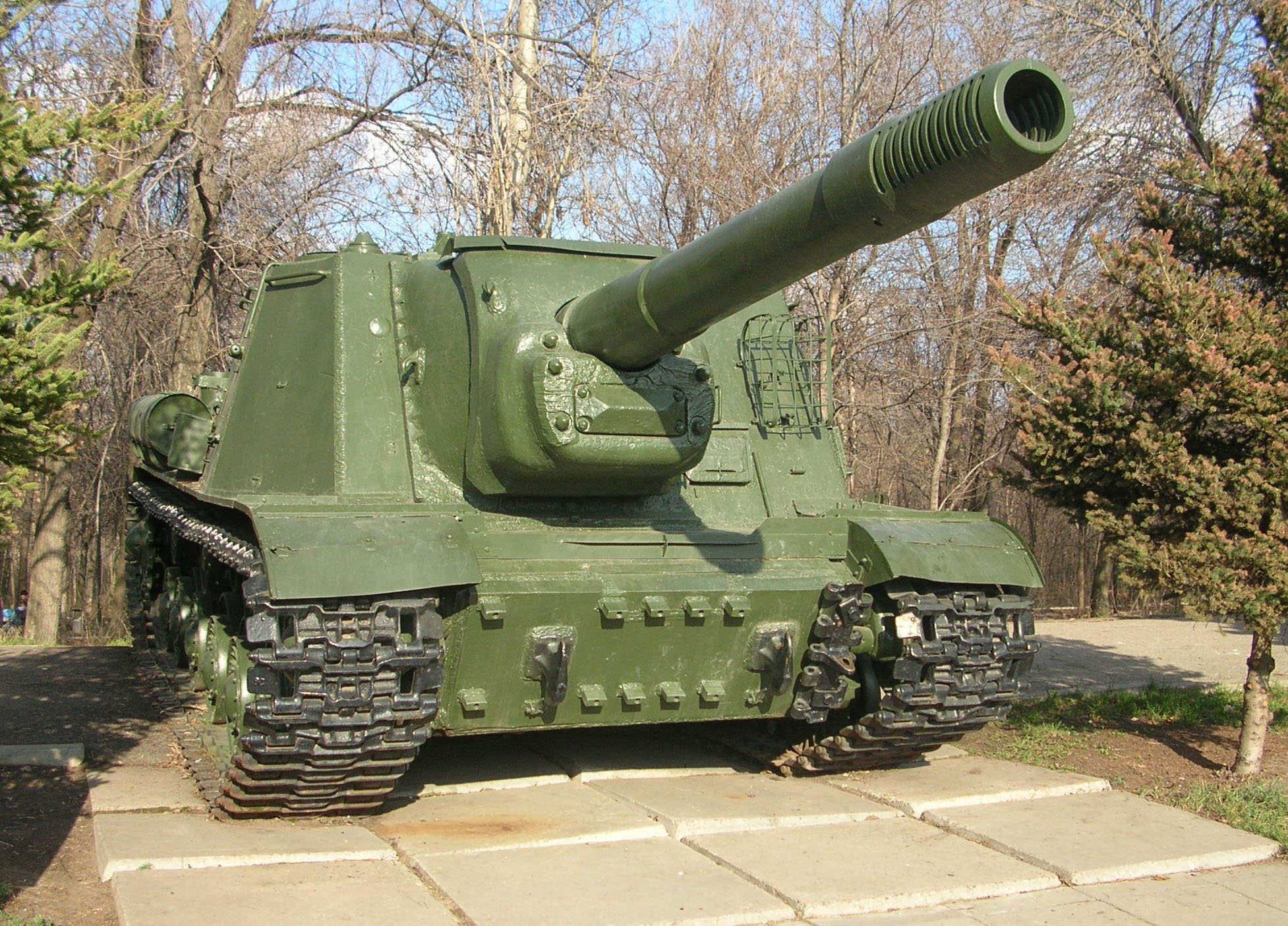 Парк Победы, г. Саратов.